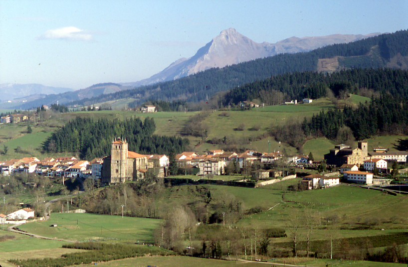 Segurako herriaren paisaia orokorra atzean Aralar eta Txindoki dituela.